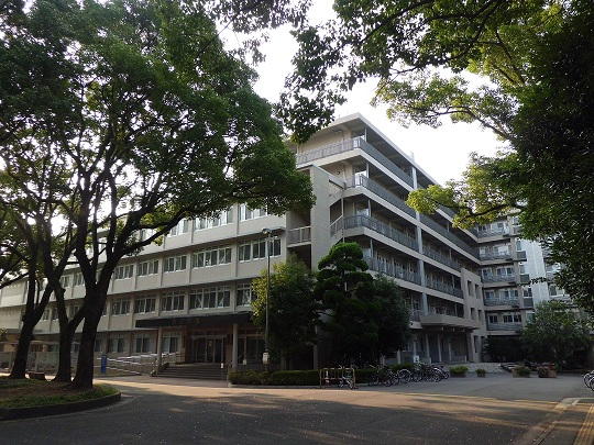 長崎大学教育学部棟